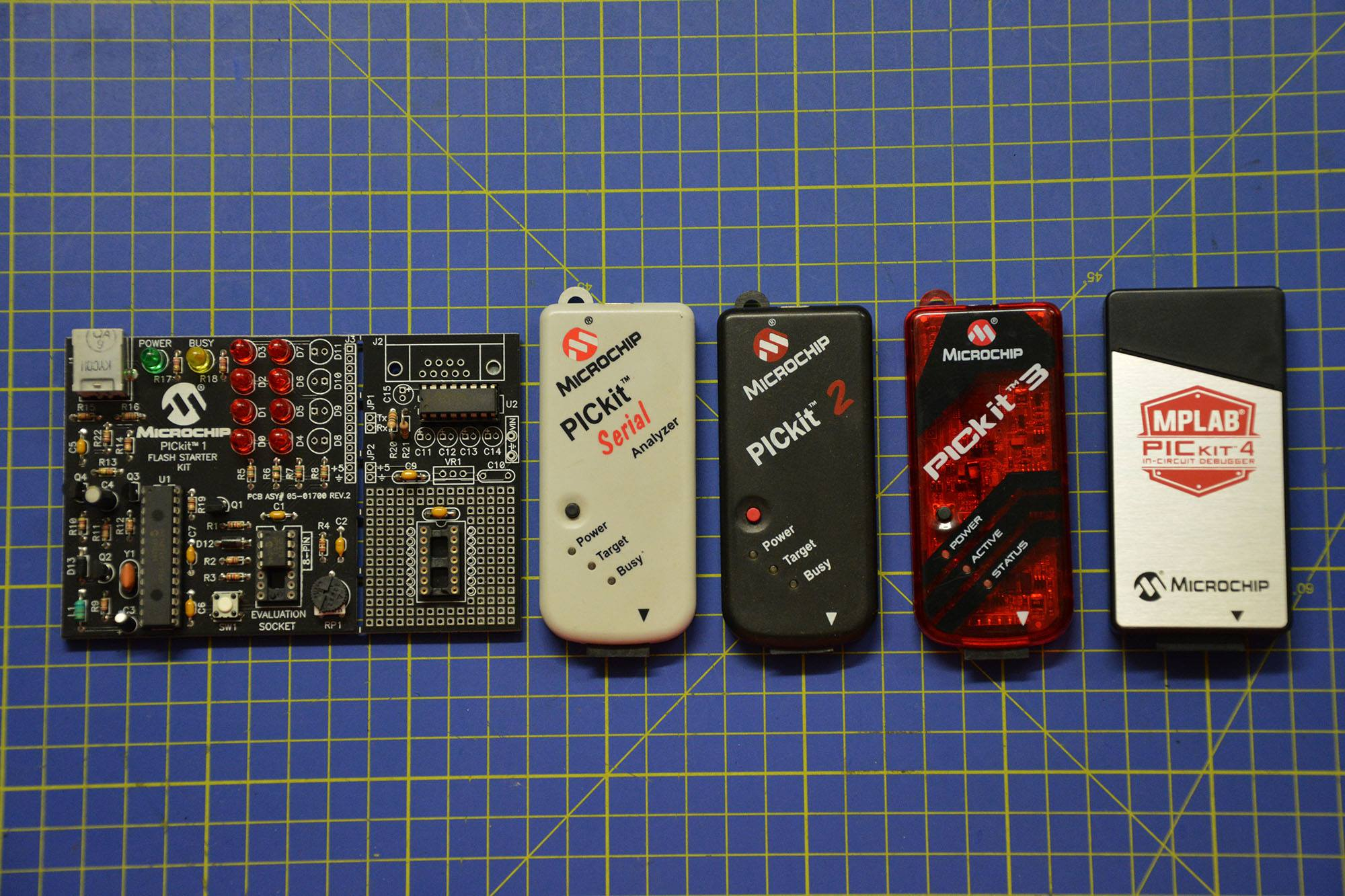 Famiglia PICkit, foto per gentile concessione di Da sinistra verso destra: PICkit1 (2003), PICkit Serial Analyzer (2007), PICkit2 (2005), PICkit3 (2008), PICkit4 (2018)